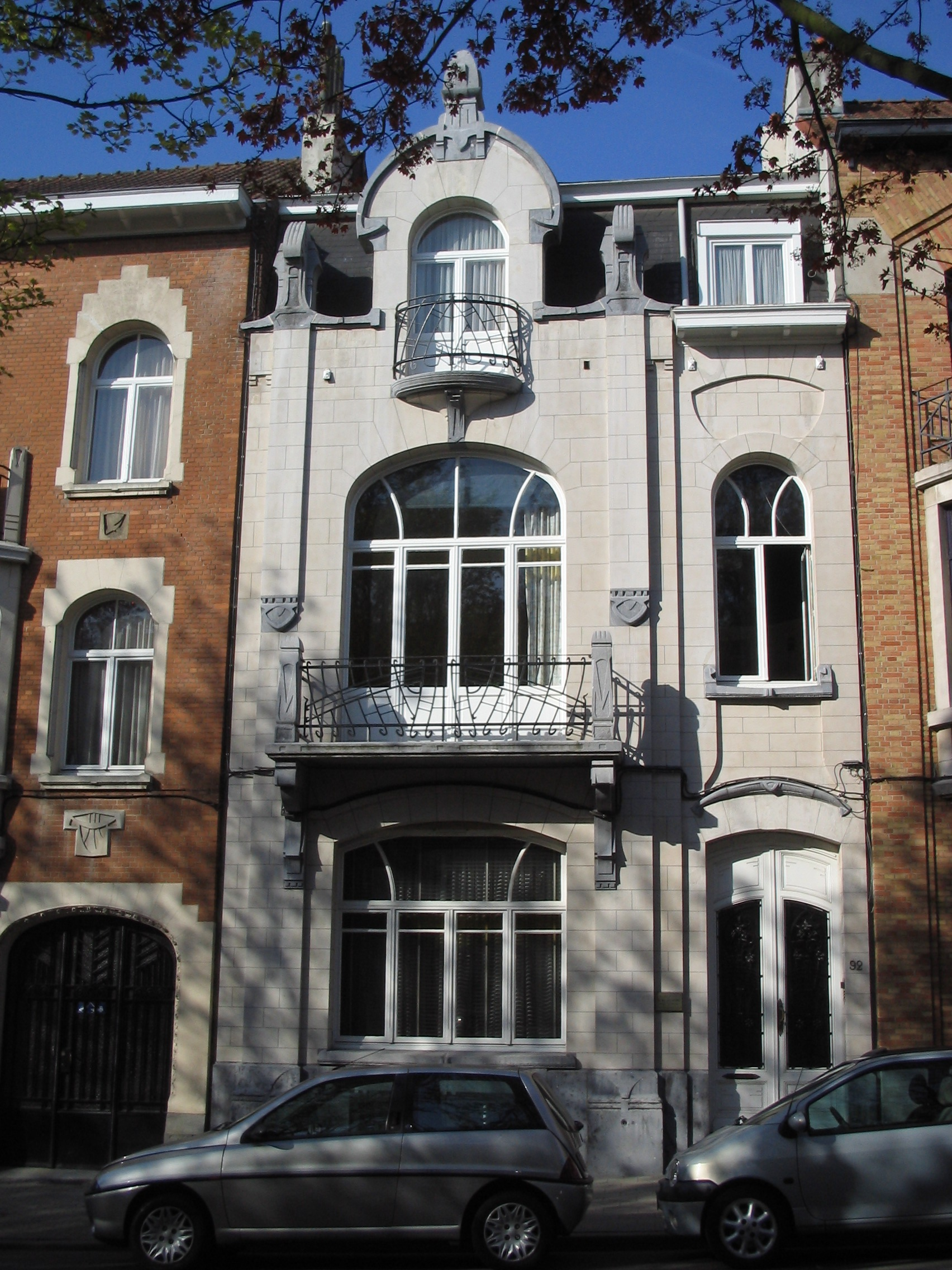 Maison de style Art nouveau au 92 avenue Seghers. Koekelberg.